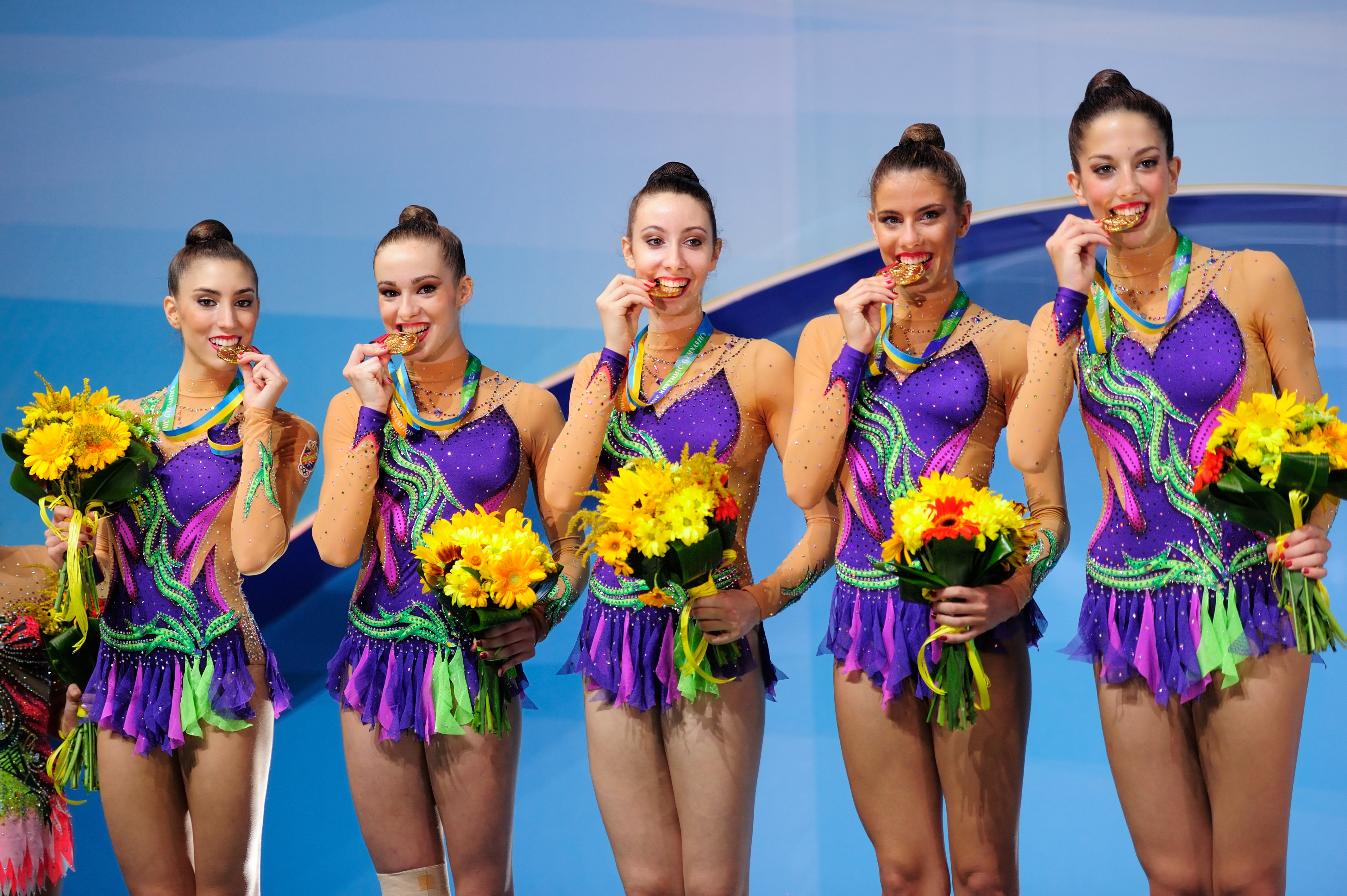 El conjunto español de gimnasia rítmica con la medalla de oro en el podio de la final de 10 mazas en el Campeonato Mundial de Kiev en 2013.